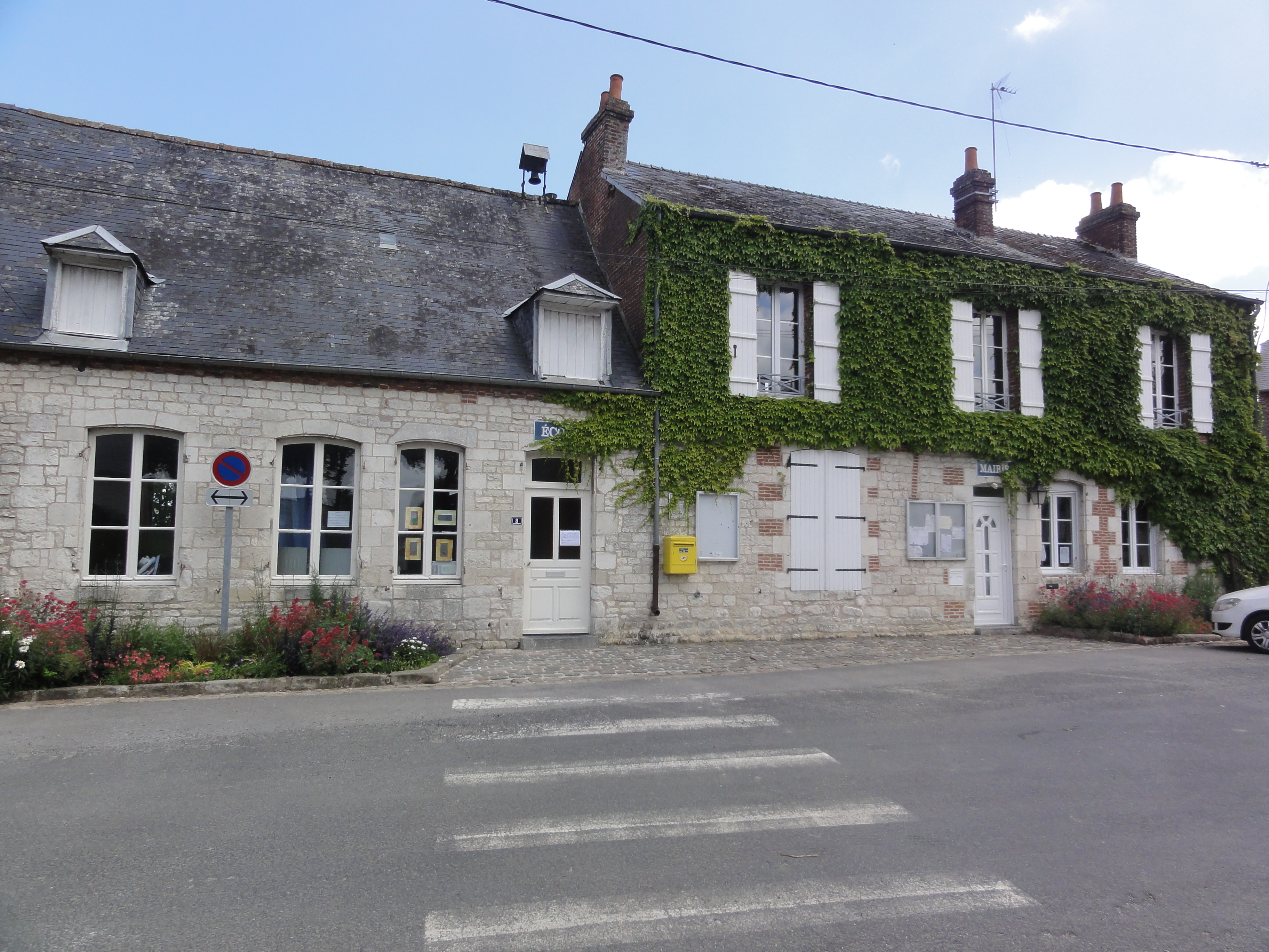 Ébouleau (Aisne) mairie